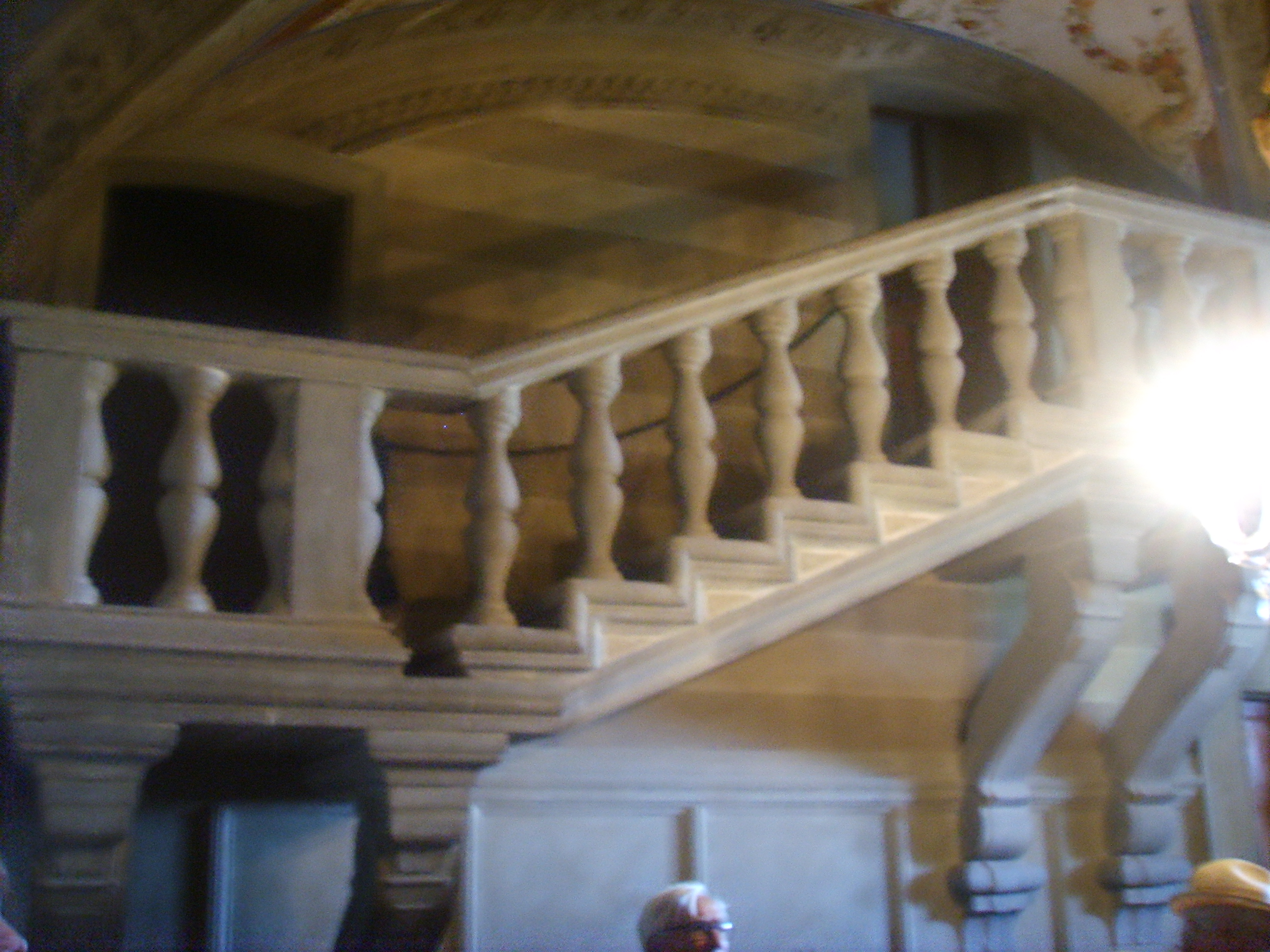 Villa medicea di Poggio a Caiano, inside Bianca Cappello Apartments in Poggio a Caiano, Italy